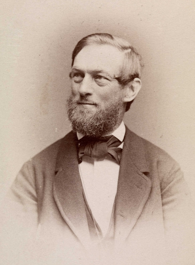 Jacob Dybwad (1823-1899) var en norsk bokhandler og forlegger.